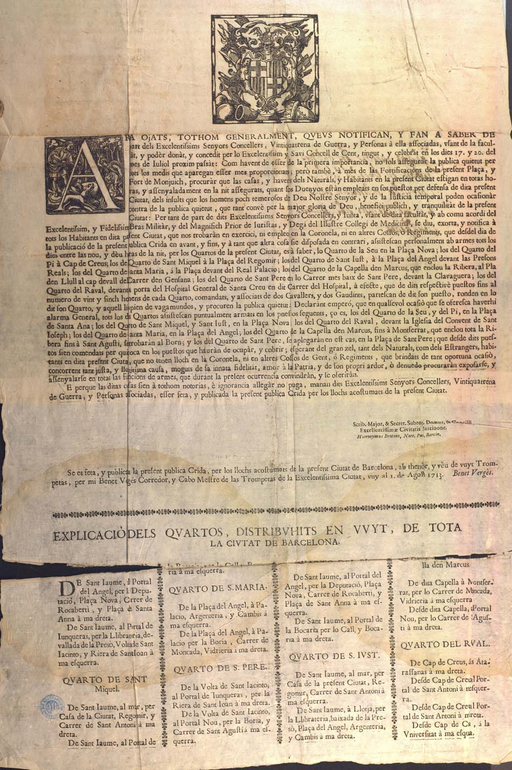 Movilización total de los civiles durante el bloqueo y sitio de Barcelona de 1713-1714